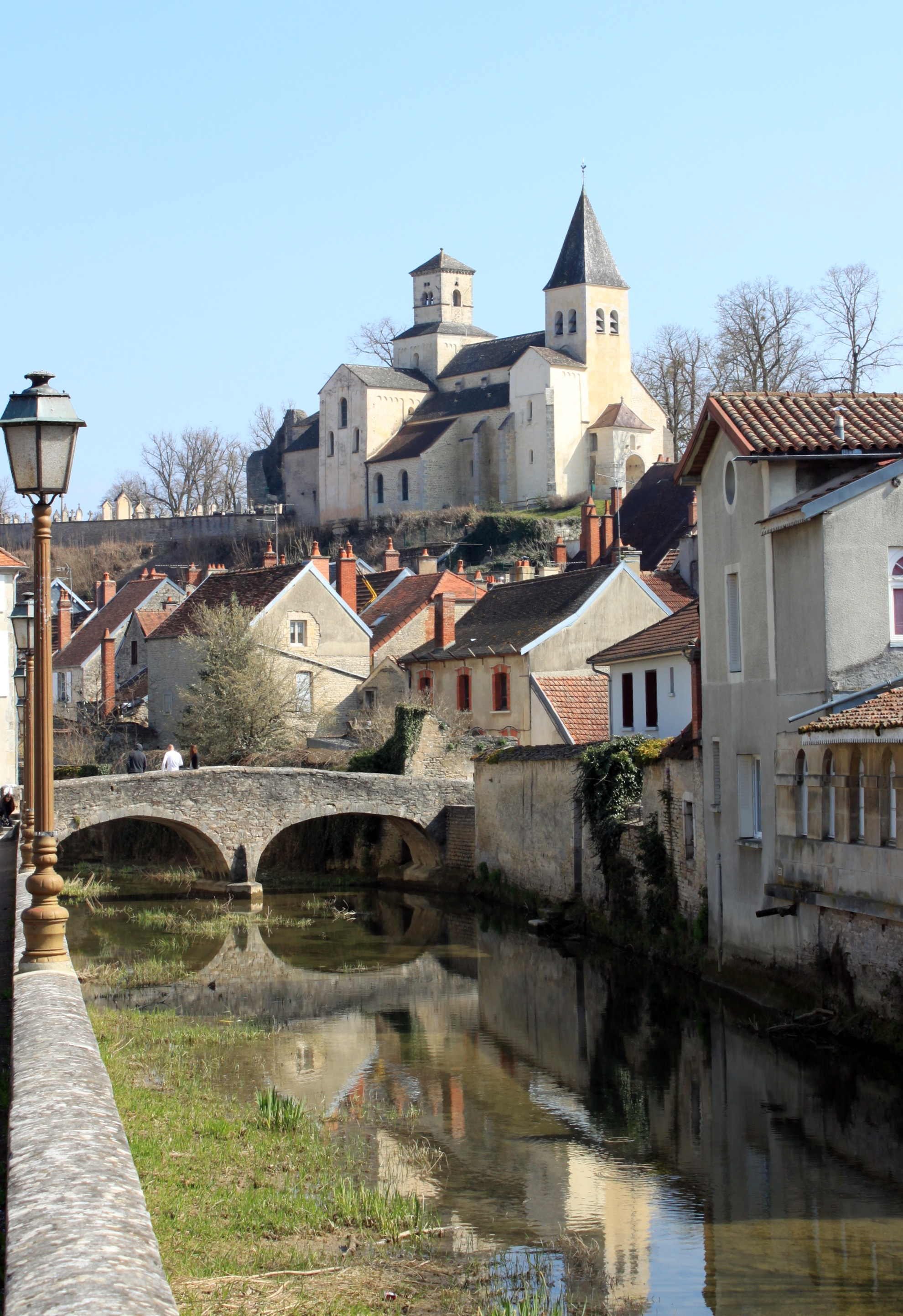 Châtillon-sur-Seine, Côte-d'Or, Bourgogne, France